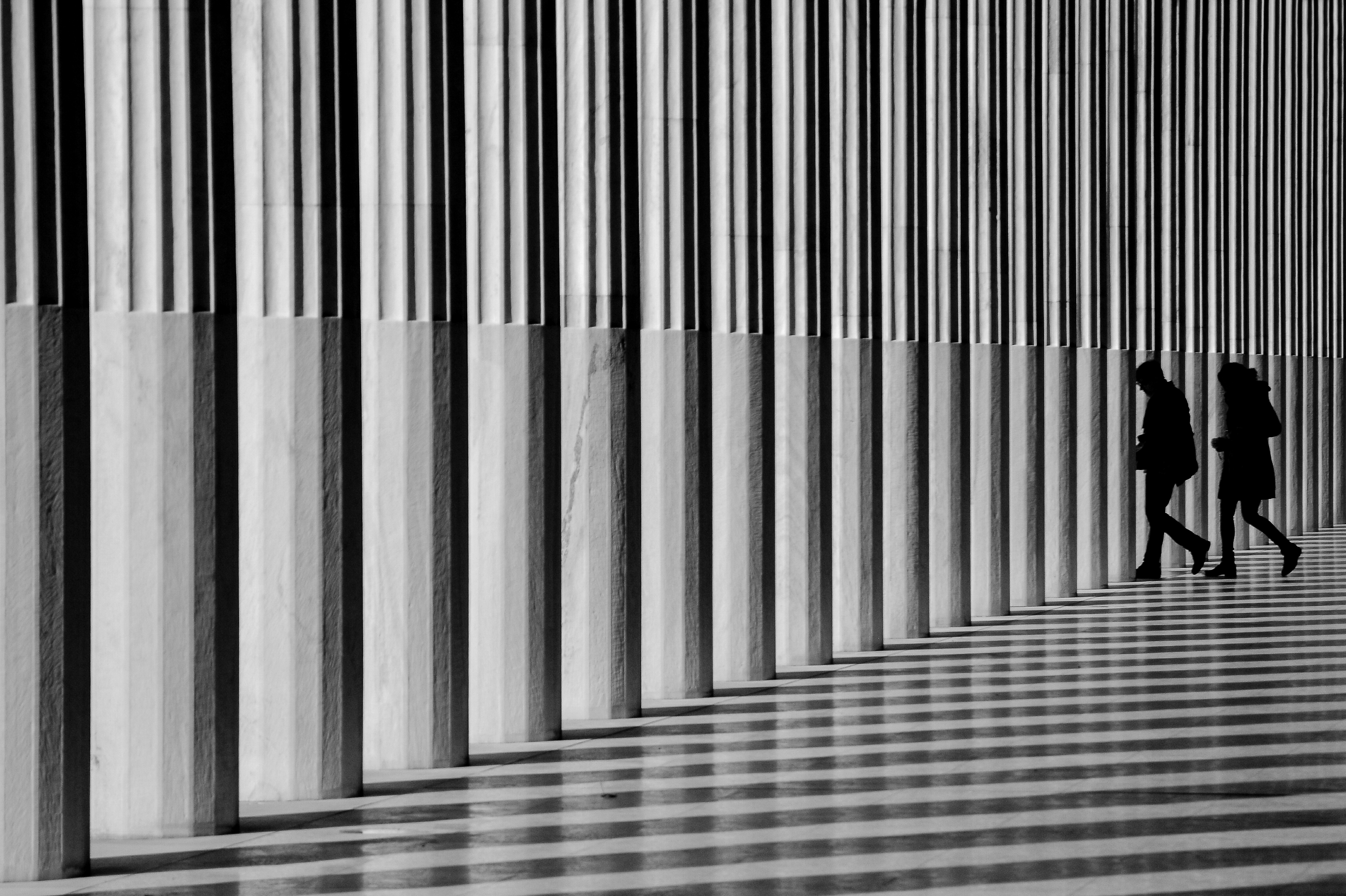 Στοά Αττάλου«Στοά Αττάλου»